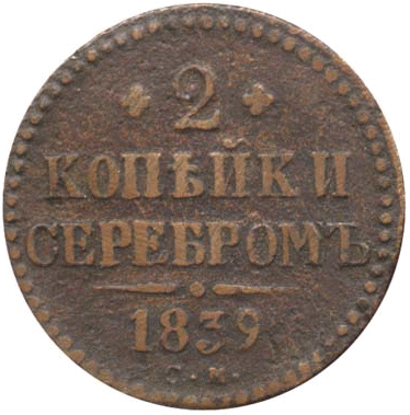 изображение реверса двухкопеечной монеты денежной реформы 1839-44гг.